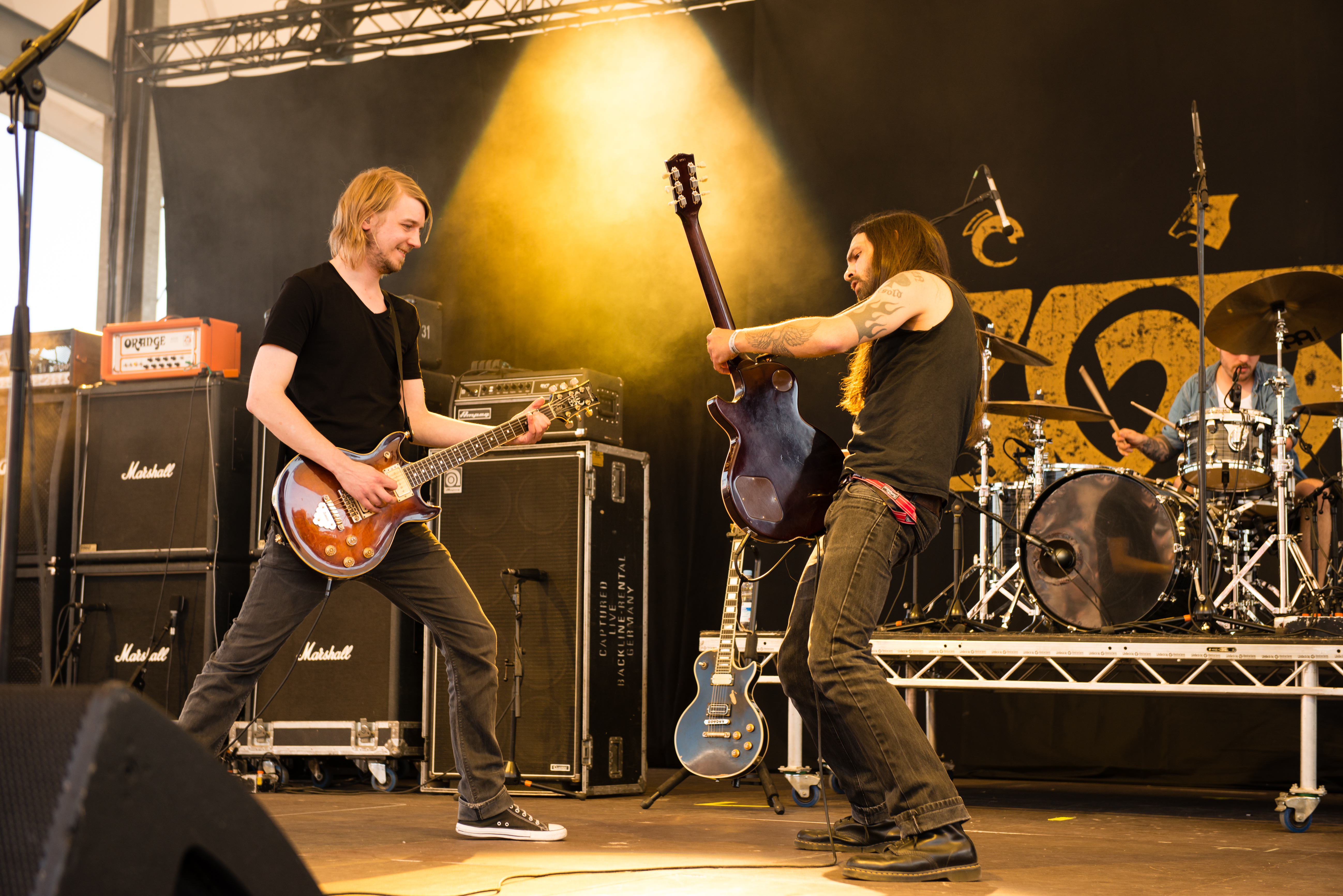 'Rock Hard Festival 2014 - Gelsenkirchen': 'Zodiac'